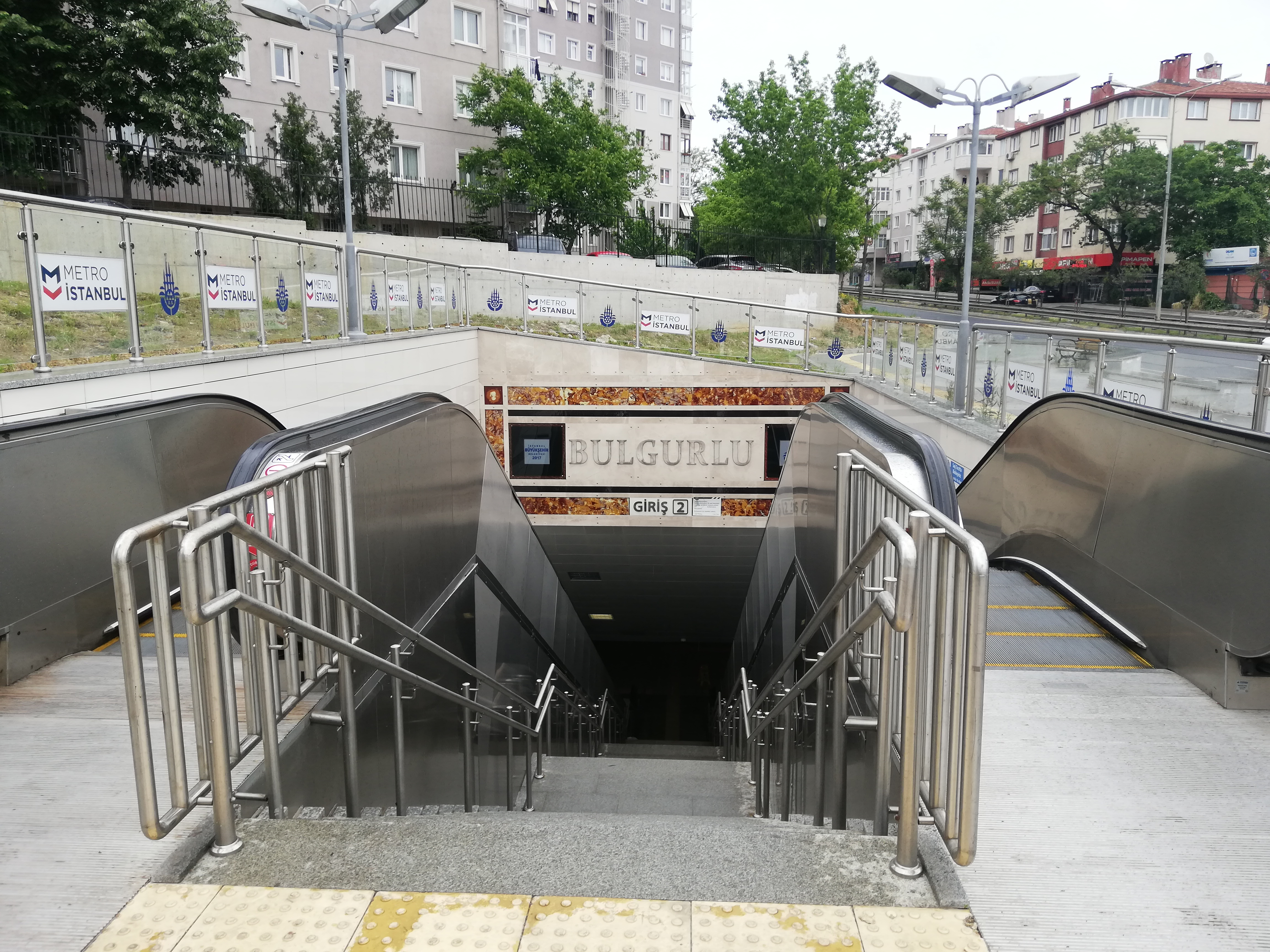 Bulgurlu İstasyonu 2. Çıkış